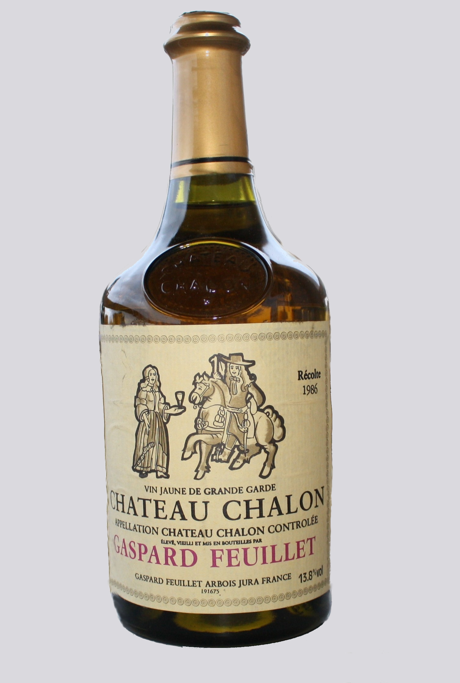 Vin de Château-Chalon - Un clavelin est une bouteille de forme originale et atypique, ne servant qu'à contenir le vin jaune du vignoble du Jura. Sa contenance de 62 centilitres ainsi que sa forme bénéficient d'une dérogation à la législation européenne